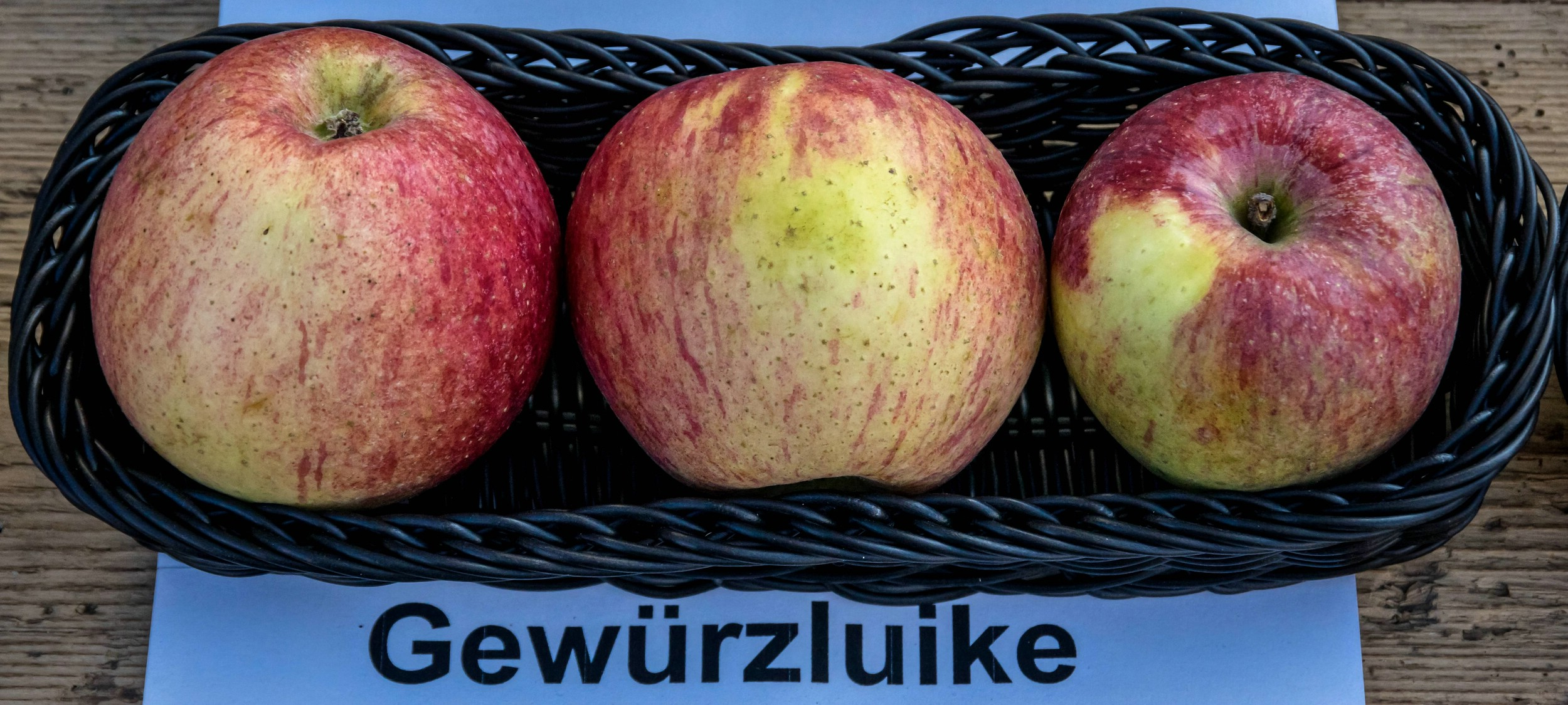 Alte Apfelsorten, von denen es im Badischen noch tragende Bäume gibt. Alle Aufnahmen au dem Oktober 2015